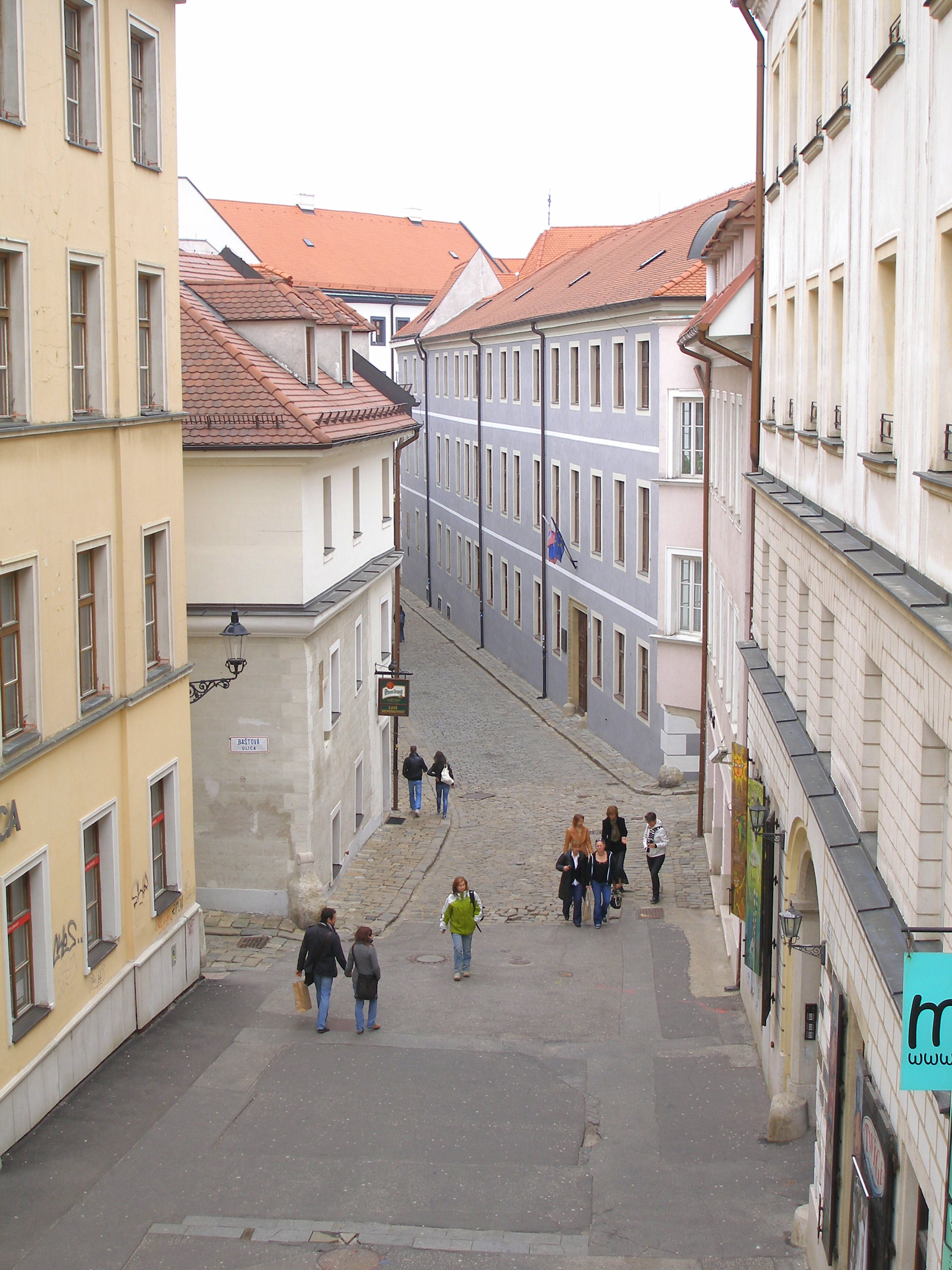 Bratislava časť Staré mesto